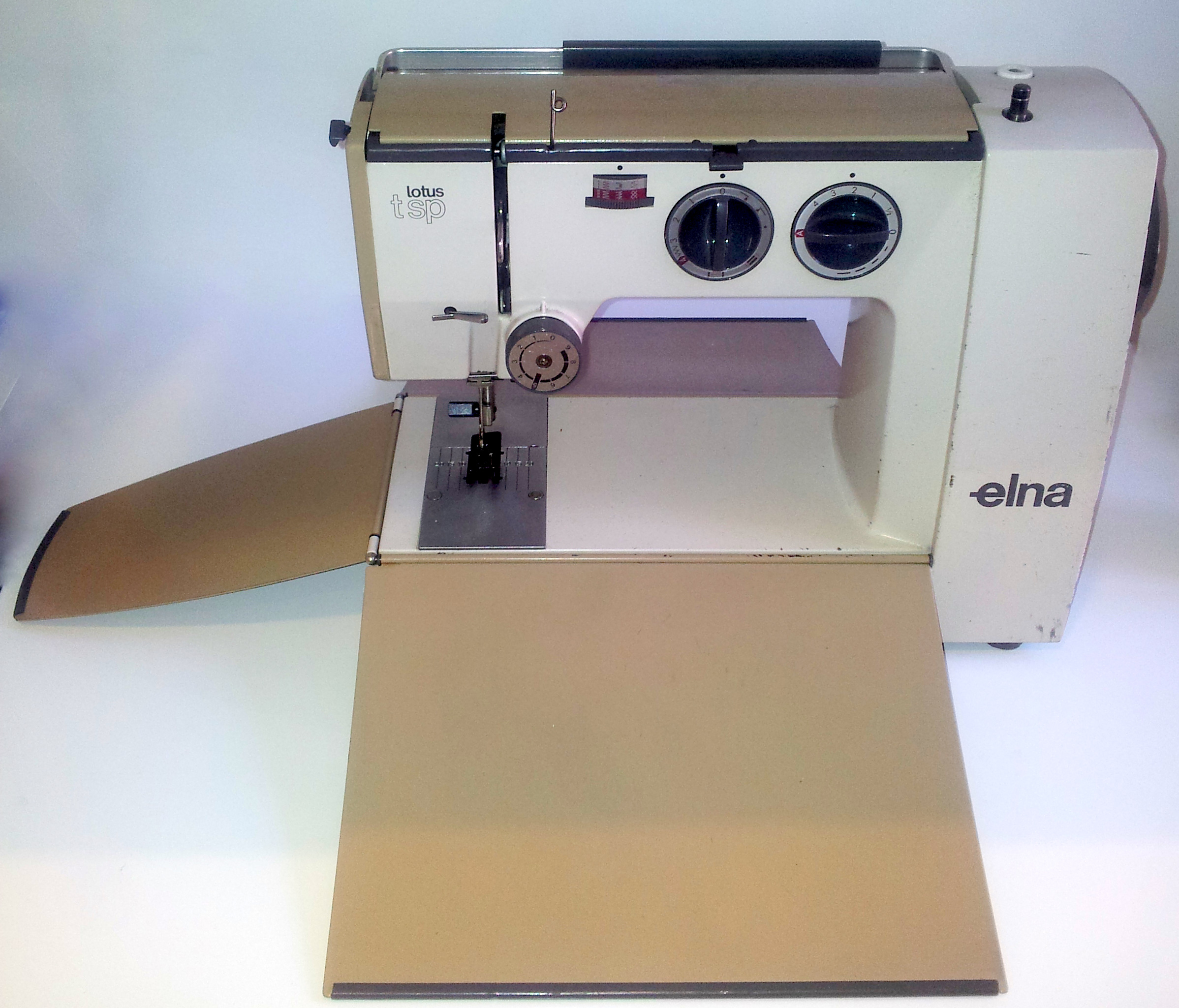 Elna Lotus ouverte du même modèle que la Museum of Modern Art